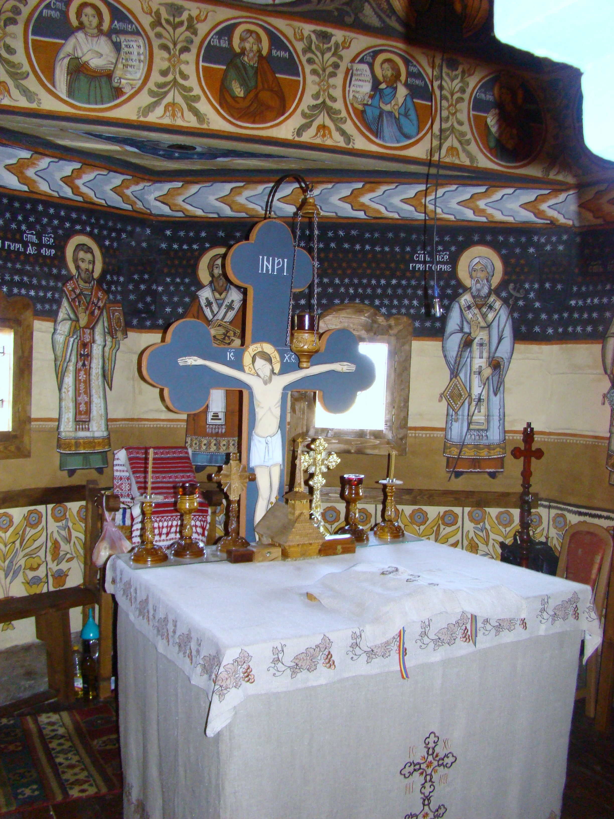 Biserica de lemn „Sf. Trei Ierarhi" din Ghighișeni mutată la Cucuceni